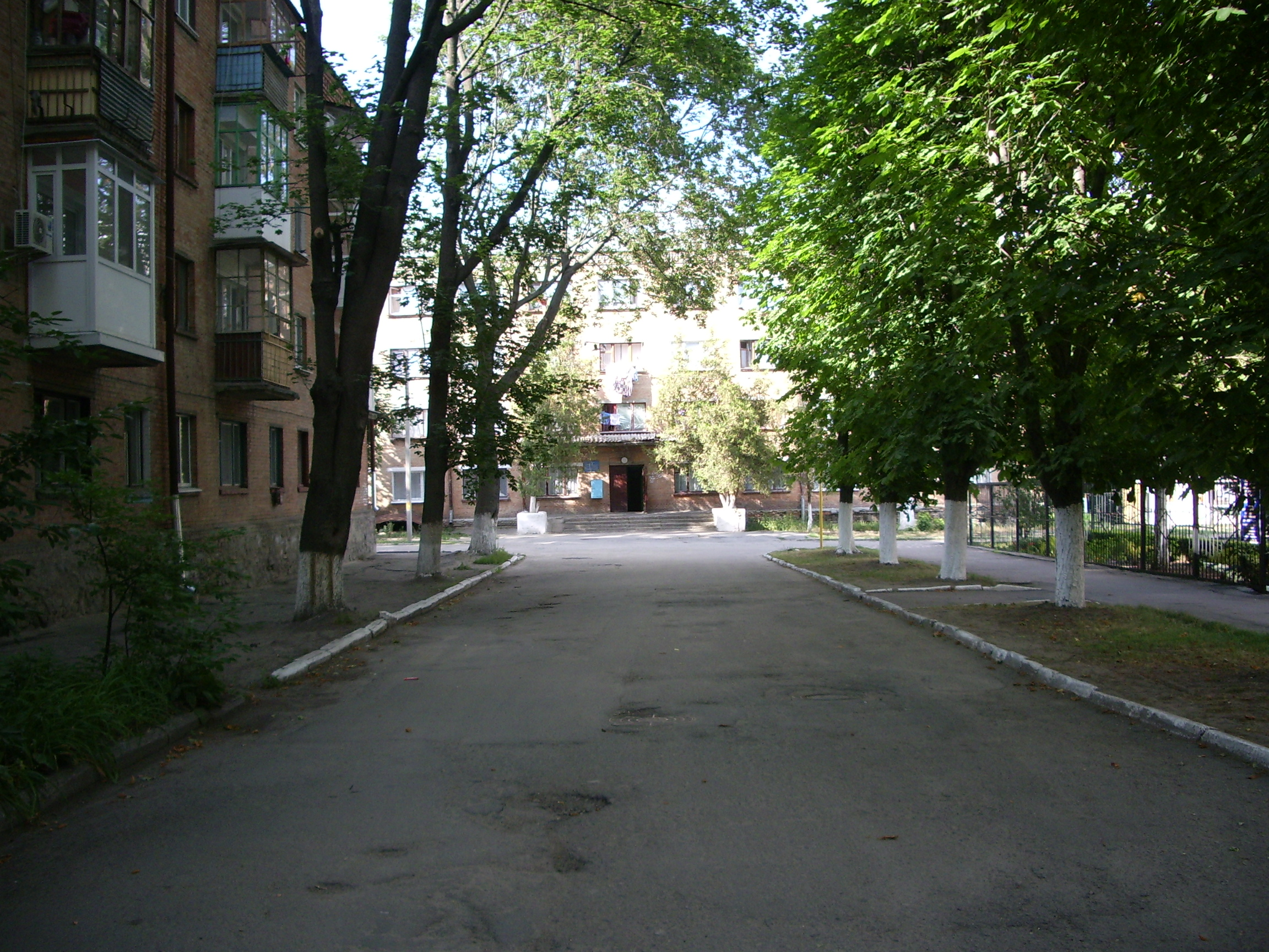 Початок вулиці Арсенія Тарковського у Кіровограді